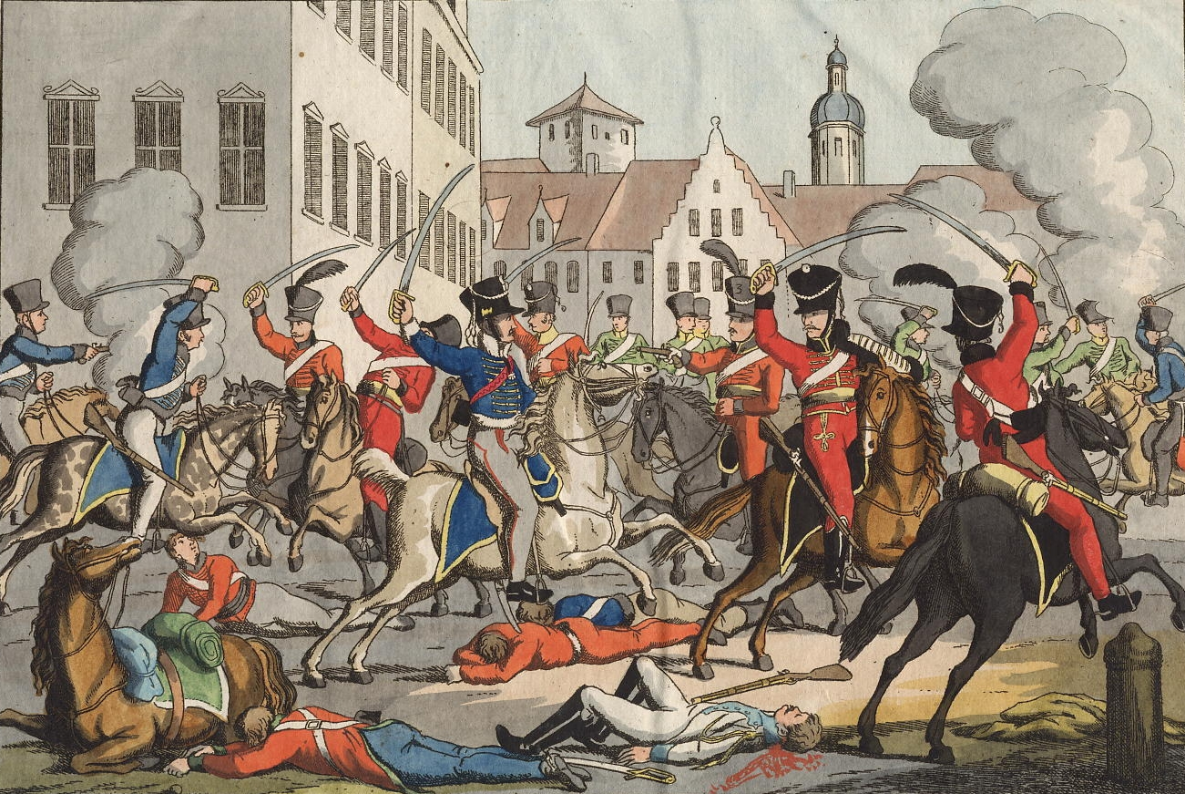 Gefecht in Stralsund zwischen Husaren 1809.